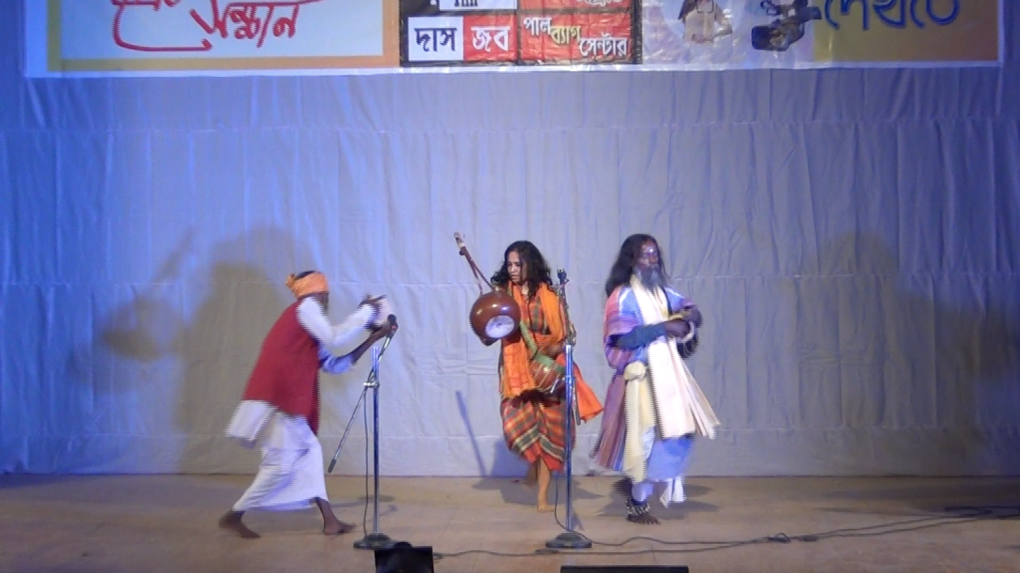 Papia Ghoshal, Fatka baba a Gamca baba na koncertu v Indii, Swabhumi Habra, West Bengal